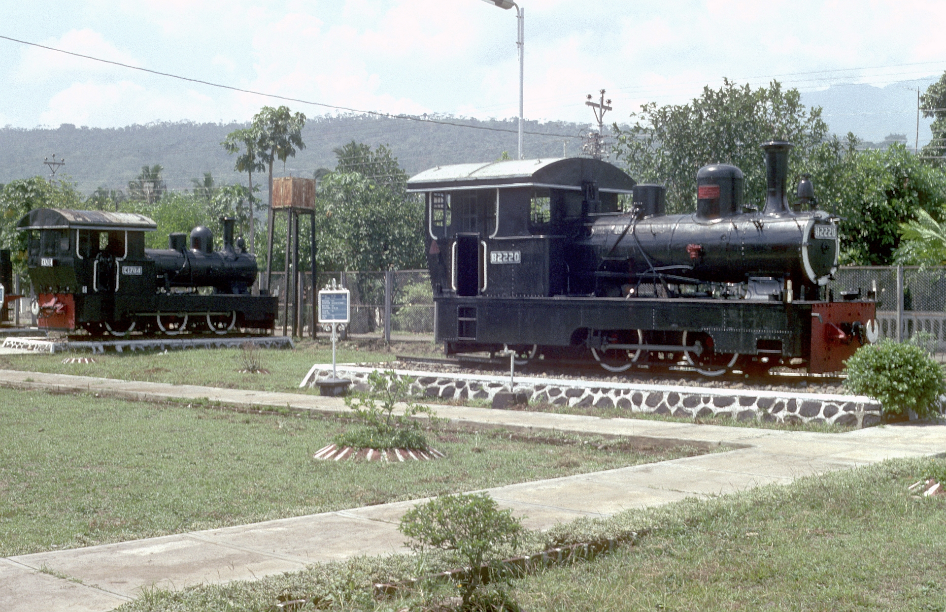 DKA B22 (B 22 20 A)